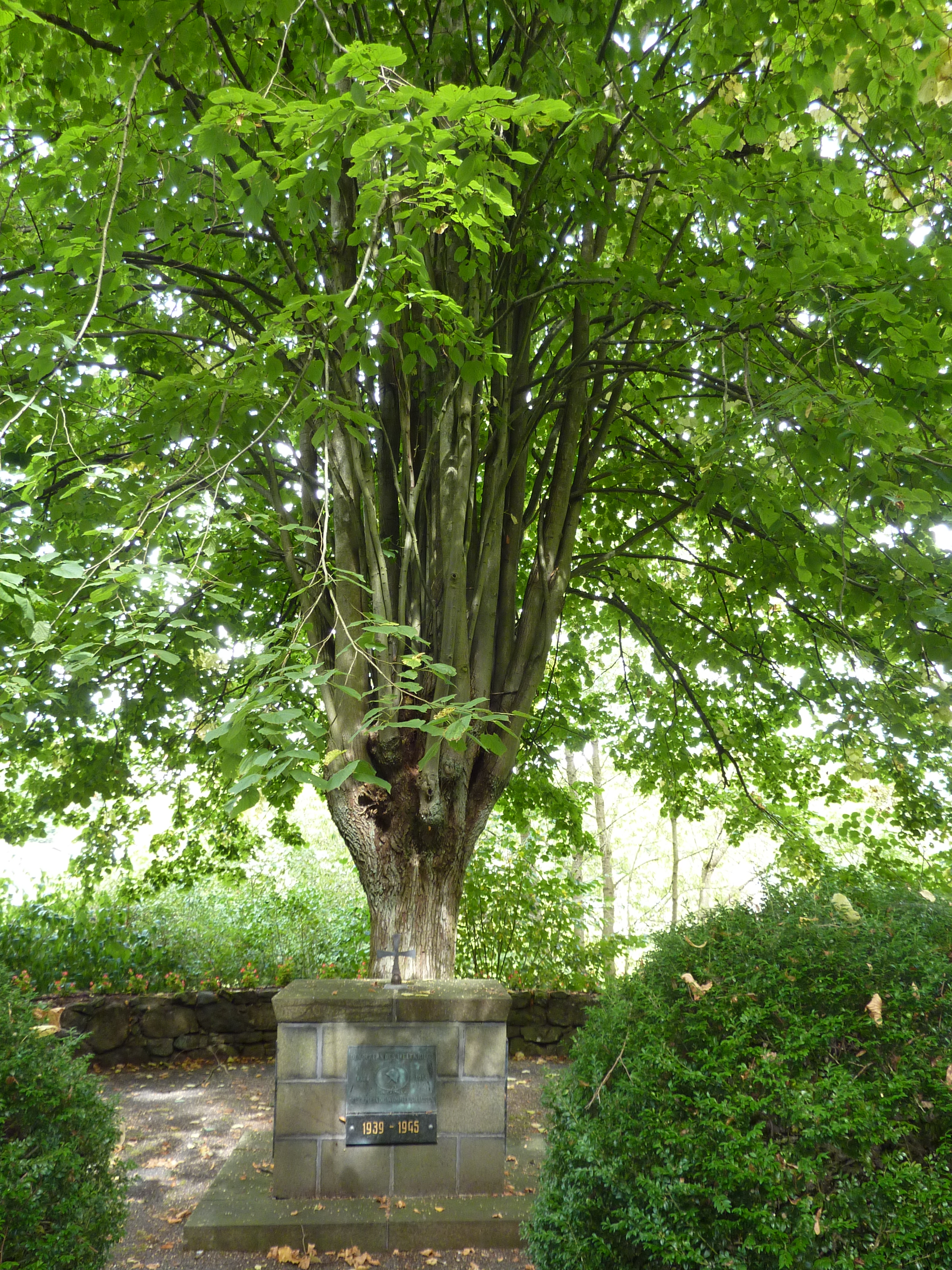 Linde am Gefallenenehrenmal Bad Endbach-Wommelshausen